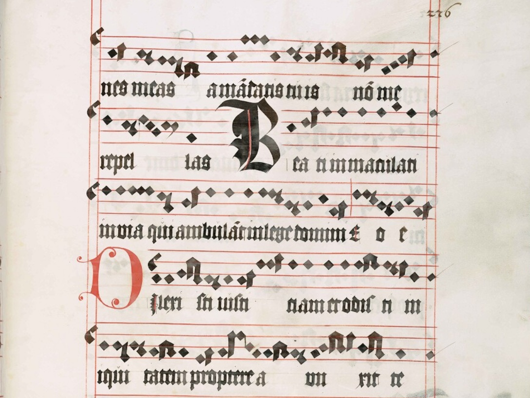 Graduál loucký (1499), strana 276, ukázka tectu se dvěma typy písařských iniciál. Vědecká knihovna v Olomouci, signatura M IV 1